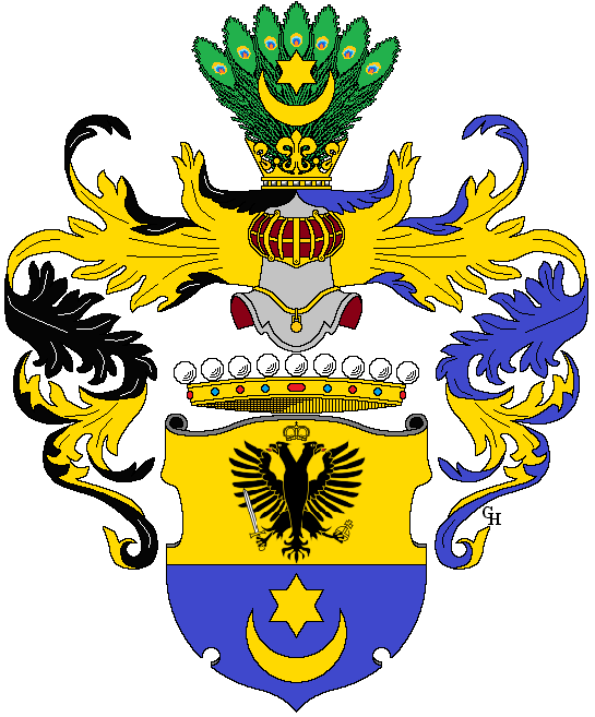 Wappen der polnischen uradeligen Familie Gołuchowski, verliehen Joseph Vincenz Gołuchowo-Gołuchowski anlässlich seiner Aufnahme in den österreichischen Grafenstand 1783. Zeichnung von Gerd Hruška ( Für weitere Informationen zu dieser Standeserhebung siehe (